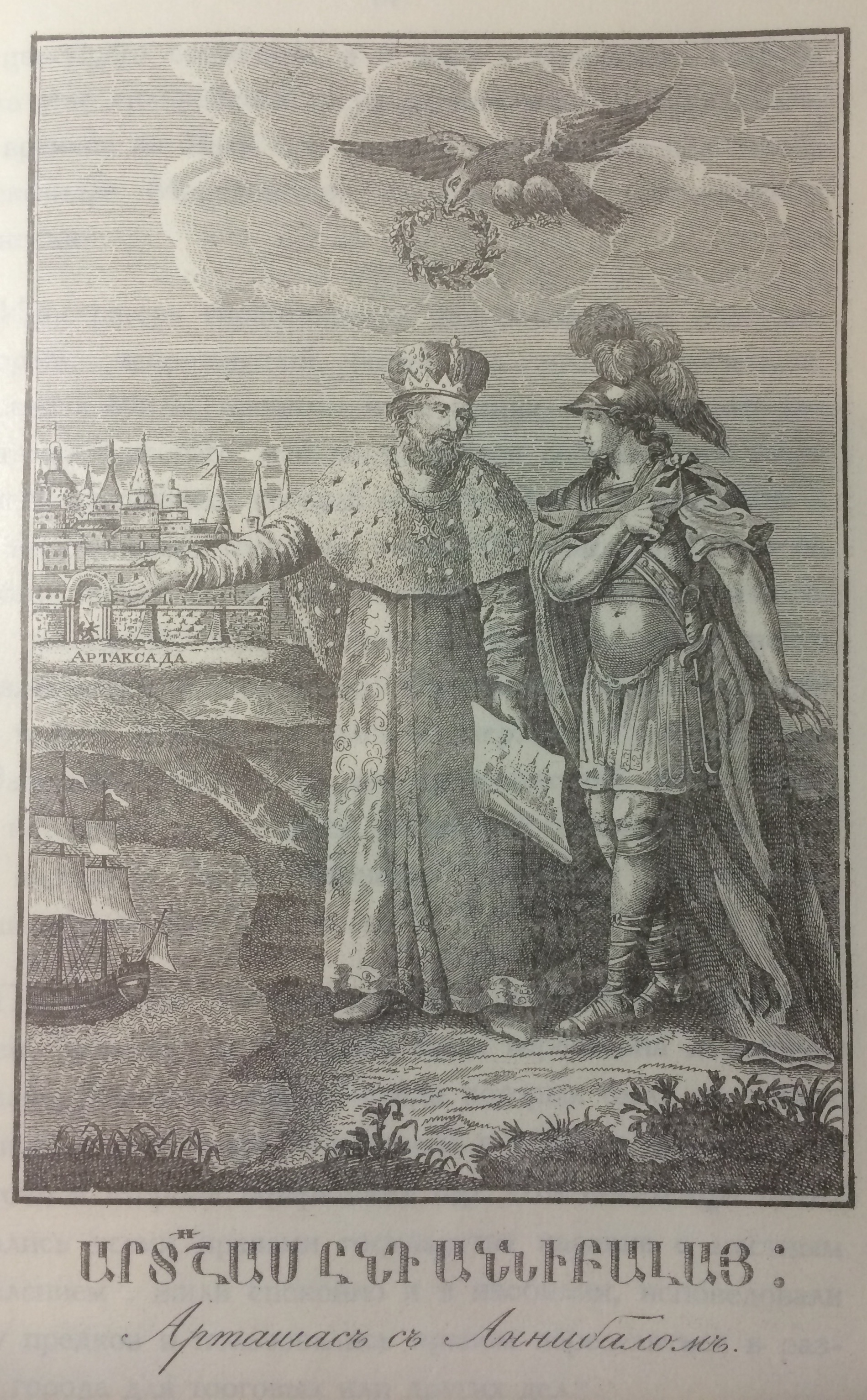 Արտաշես Ա և Հանիբալ